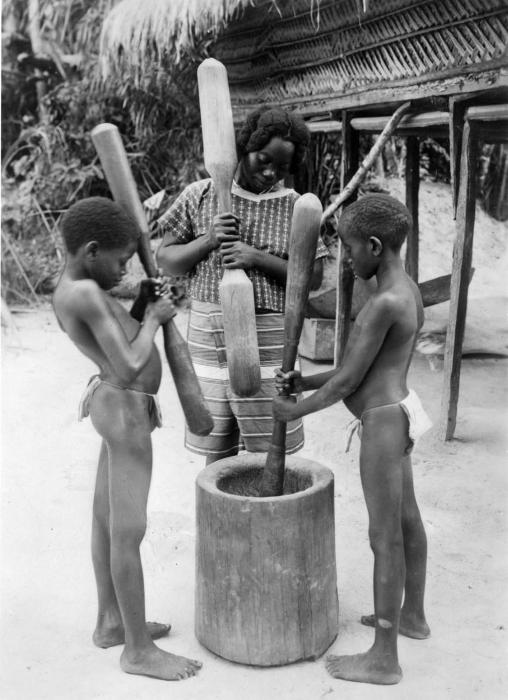 Negatief. Twee Marron jongens en een Marron vrouw zijn rijst aan het stampen in een vijzel. De twee jongens dragen een kamisa, de vrouw draagt een pangi en een blouse. Ze hebben allemaal een stamper in hun hand. De vijzel, een uitgehold blok hout, wordt gebruikt om voedselproducten (zoals rijst, cassavemeel) fijn te stampen. Ook worden pinda's en oliepalmpitten voor het maken van olie, fijn gestampt in de vijzel. . Het stampen van rijst in een Marron dorp aan de Boven Saramaccarivier